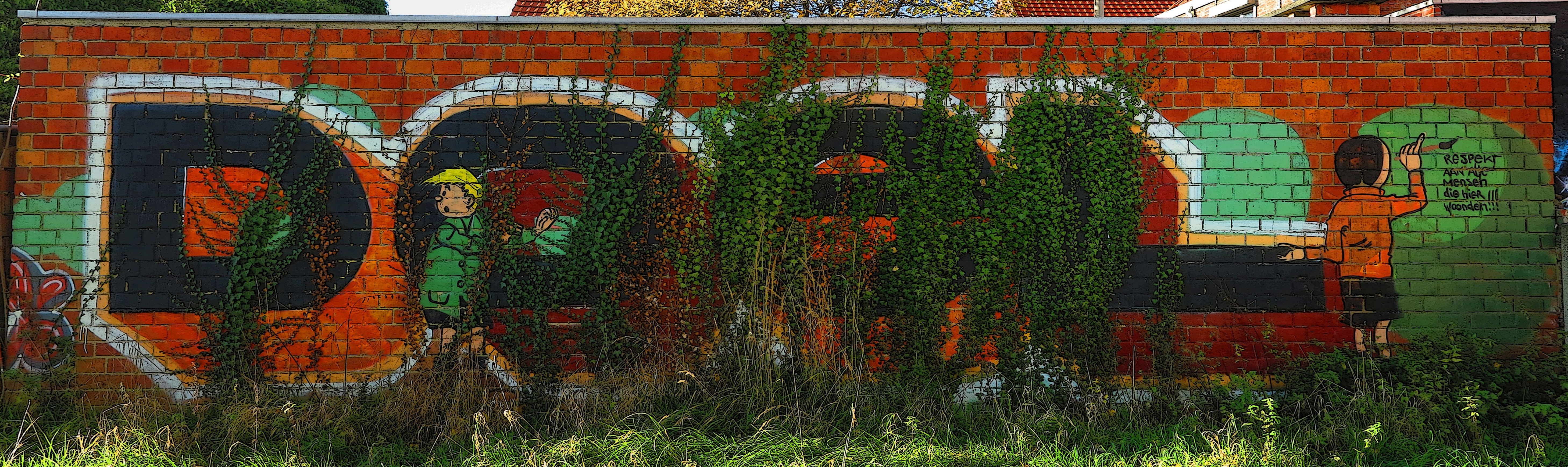 Kwik & Flupke in Doel